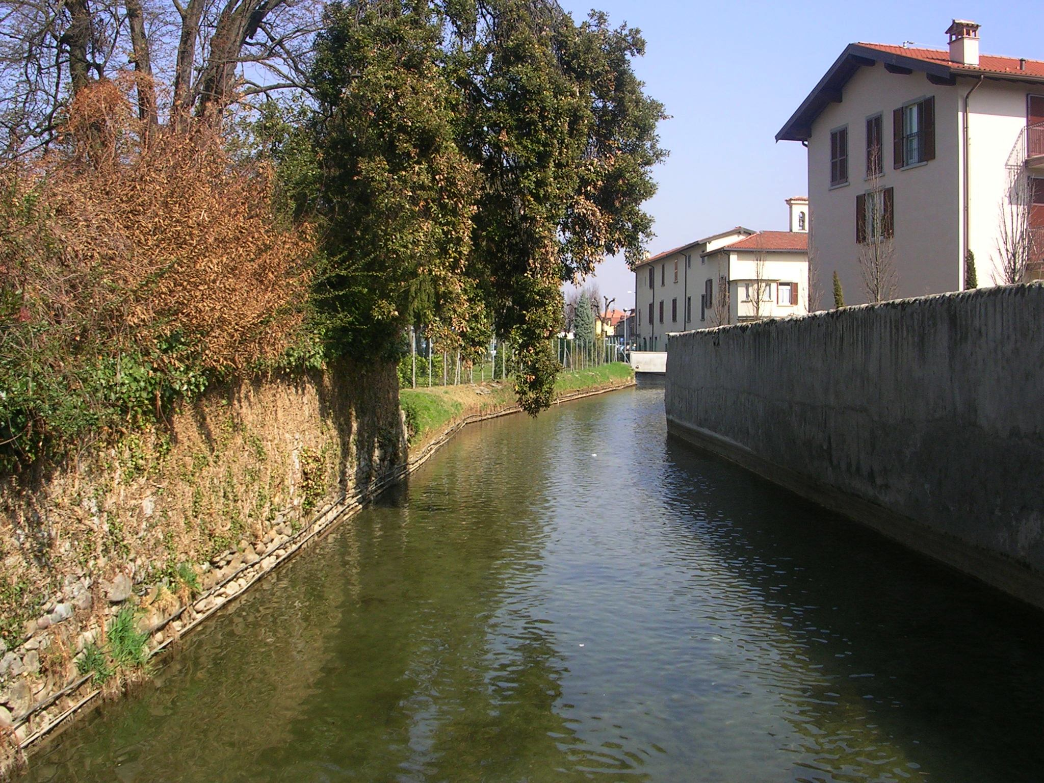 La roggia Serio Grande presso Torre Boldone (Bergamo)